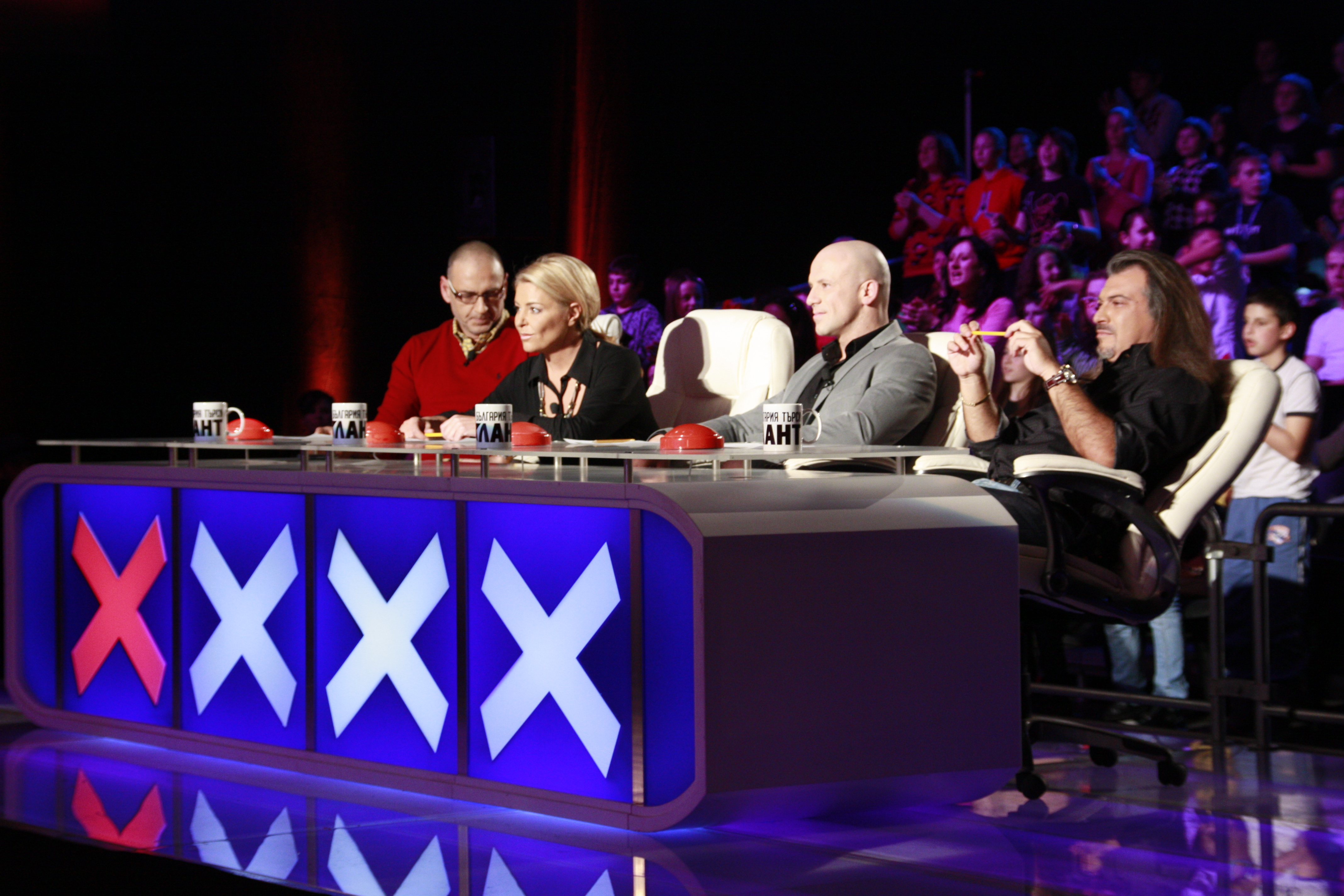 Encho Keryazov in der Jury der bulgarischen TV-Sendung "Bulgaria`s got talent"